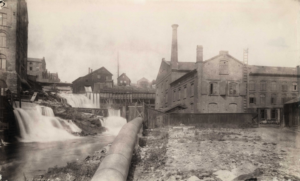 Hjula Væverier, Akerselva, Hønse-Lovisas hus, Den Norske Hesteskosømfabrik